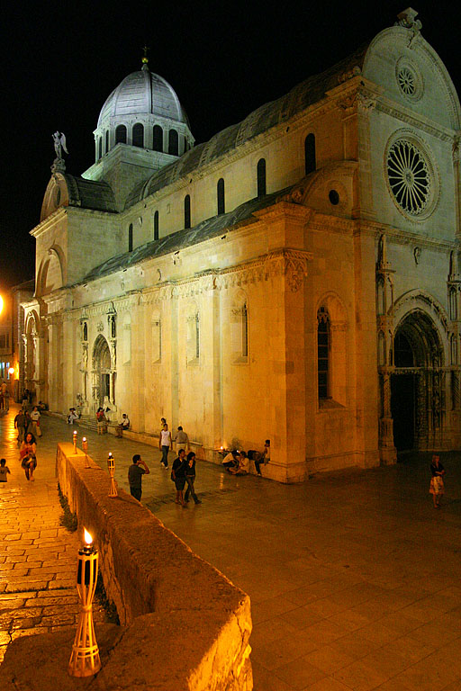 Photo prise à Šibenik en Croatie par Utilisateur:Vyskocil.